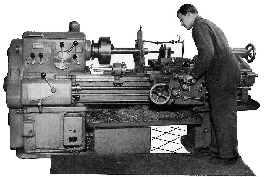 Köpingsvarv 10" typ S 10